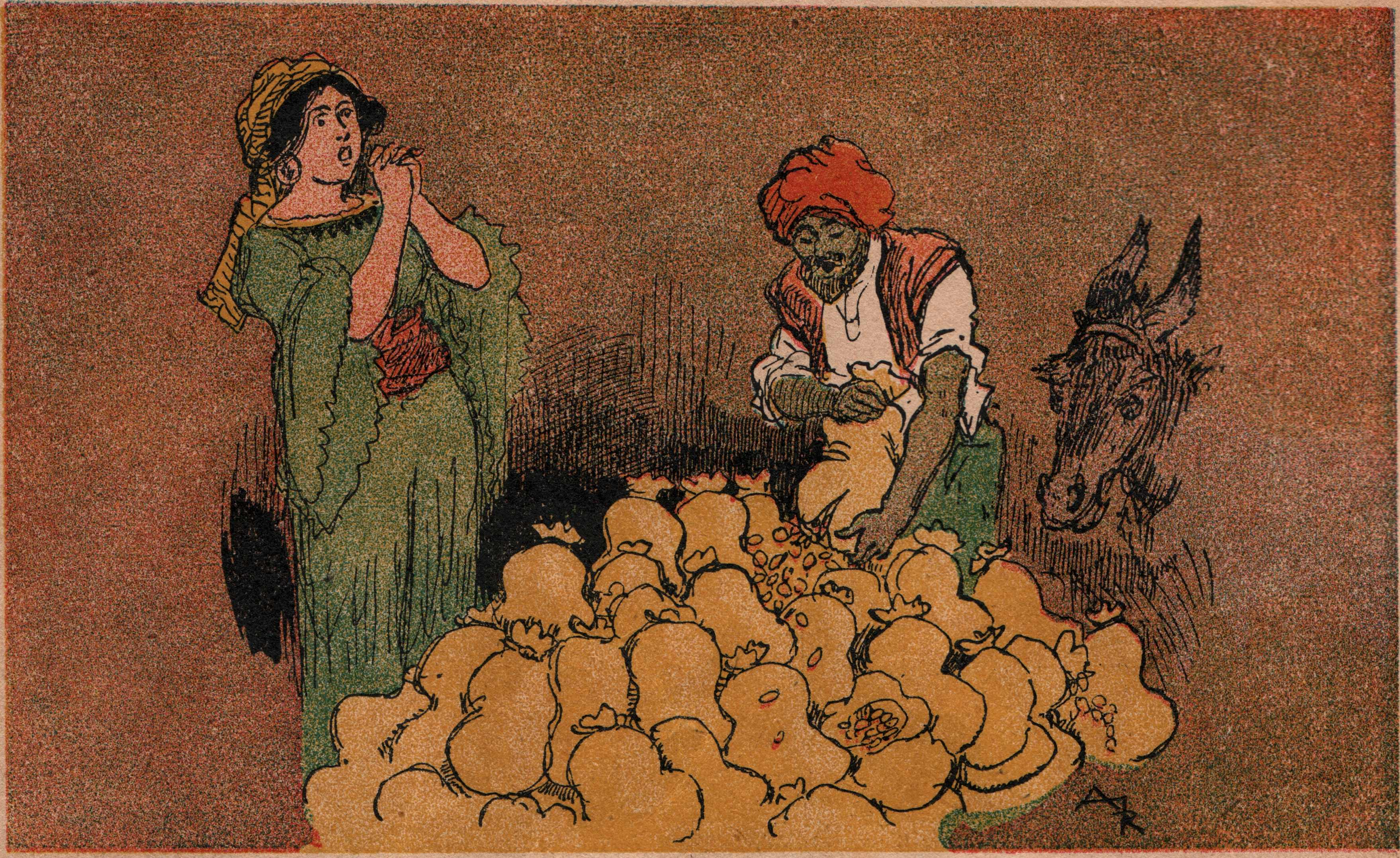 Illustration par Albert Robida du livre Ali-Baba et les quarante voleurs, page 4